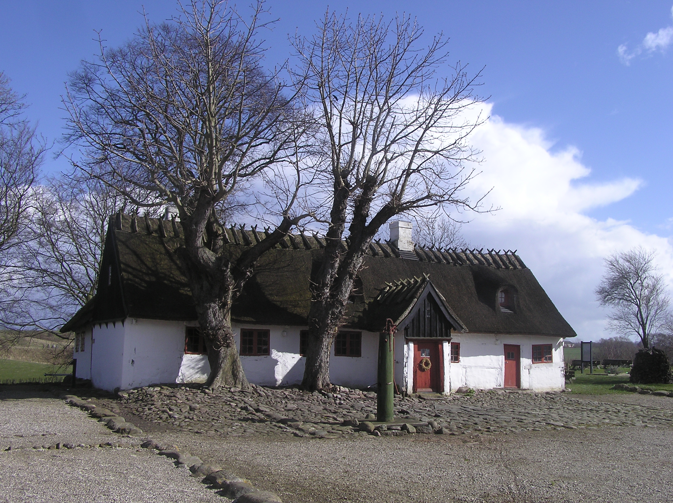 Danmark Sjælland Gammel Lejre:kongsgaard